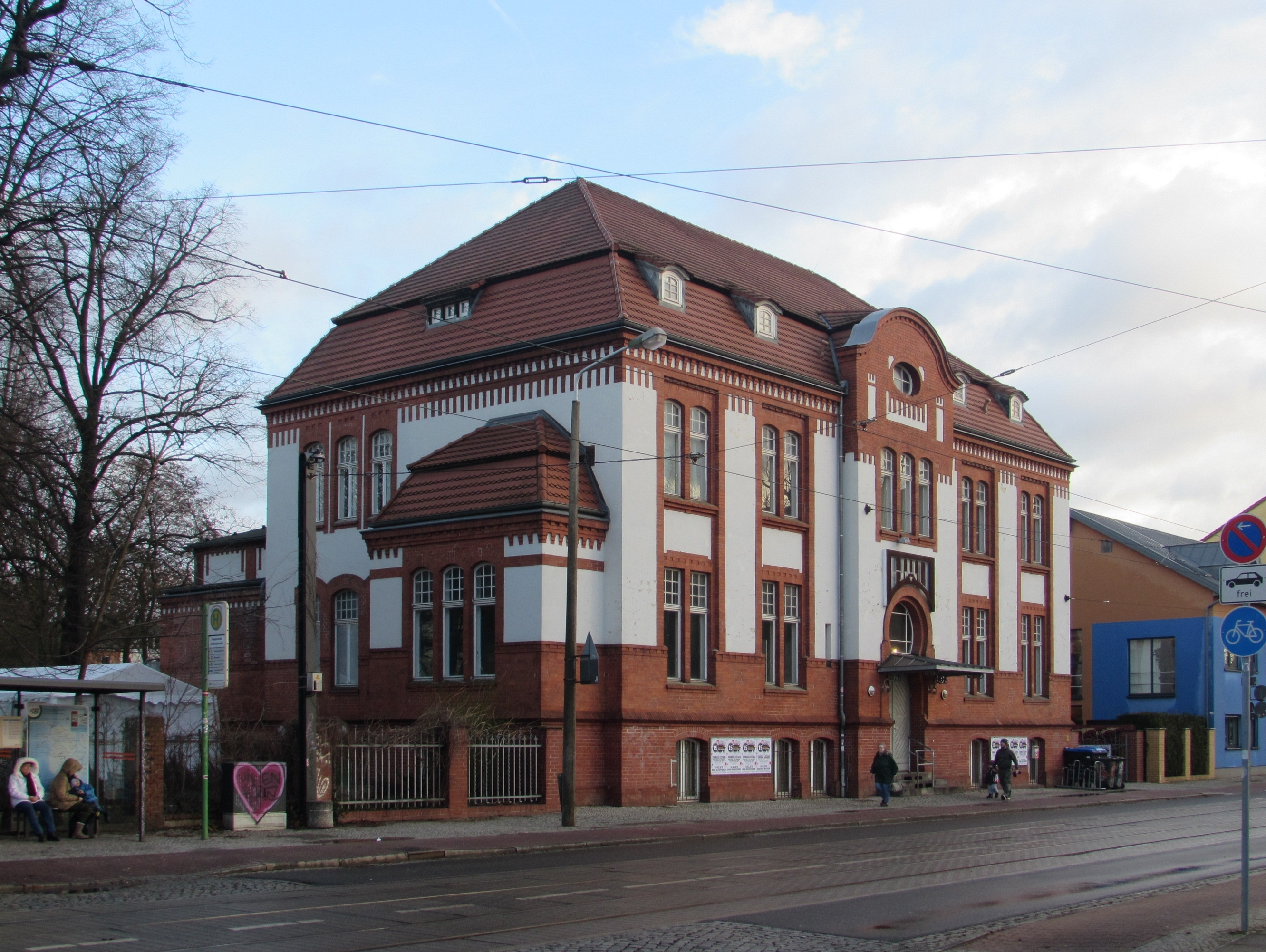 haus der offiziere, ehemaliges offizierskasino der kürassiere magdeburger straße brandenburg